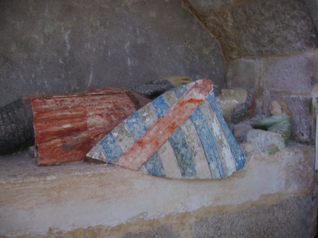 Le gisant de Guillaume VII Larchevêque, portant en écu les armes de sa famille (blason de Parthenay), dans le chœur de l'église Sainte-Croix à Parthenay.